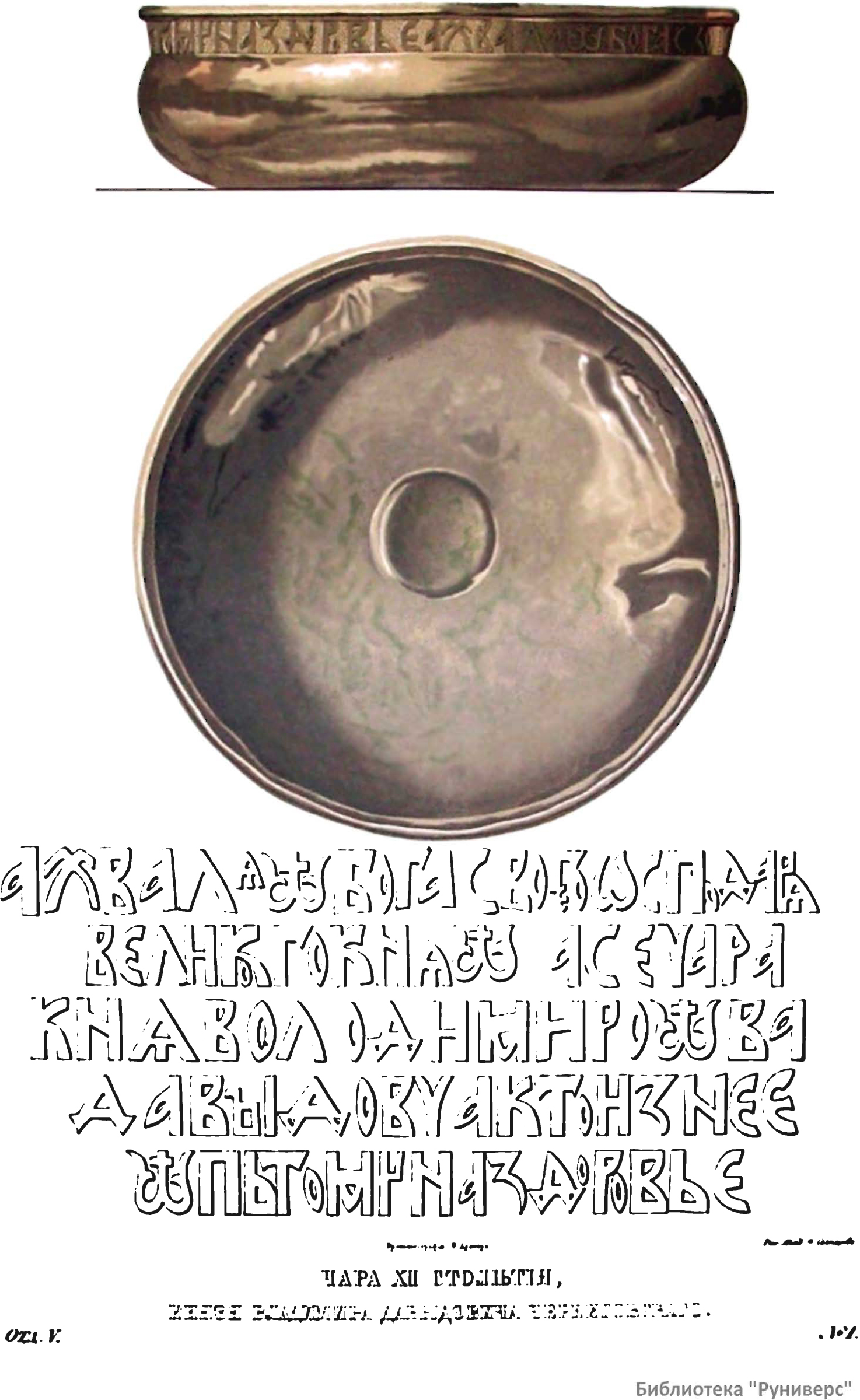 Древности Российского государства (Antiquities of Russian country), 1846—1853. Иллюстратор — Солнцев, Фёдор Григорьевич. Чара Князя Владимира Давыдовича Черниговского. Рисунок Отд. V. № 1